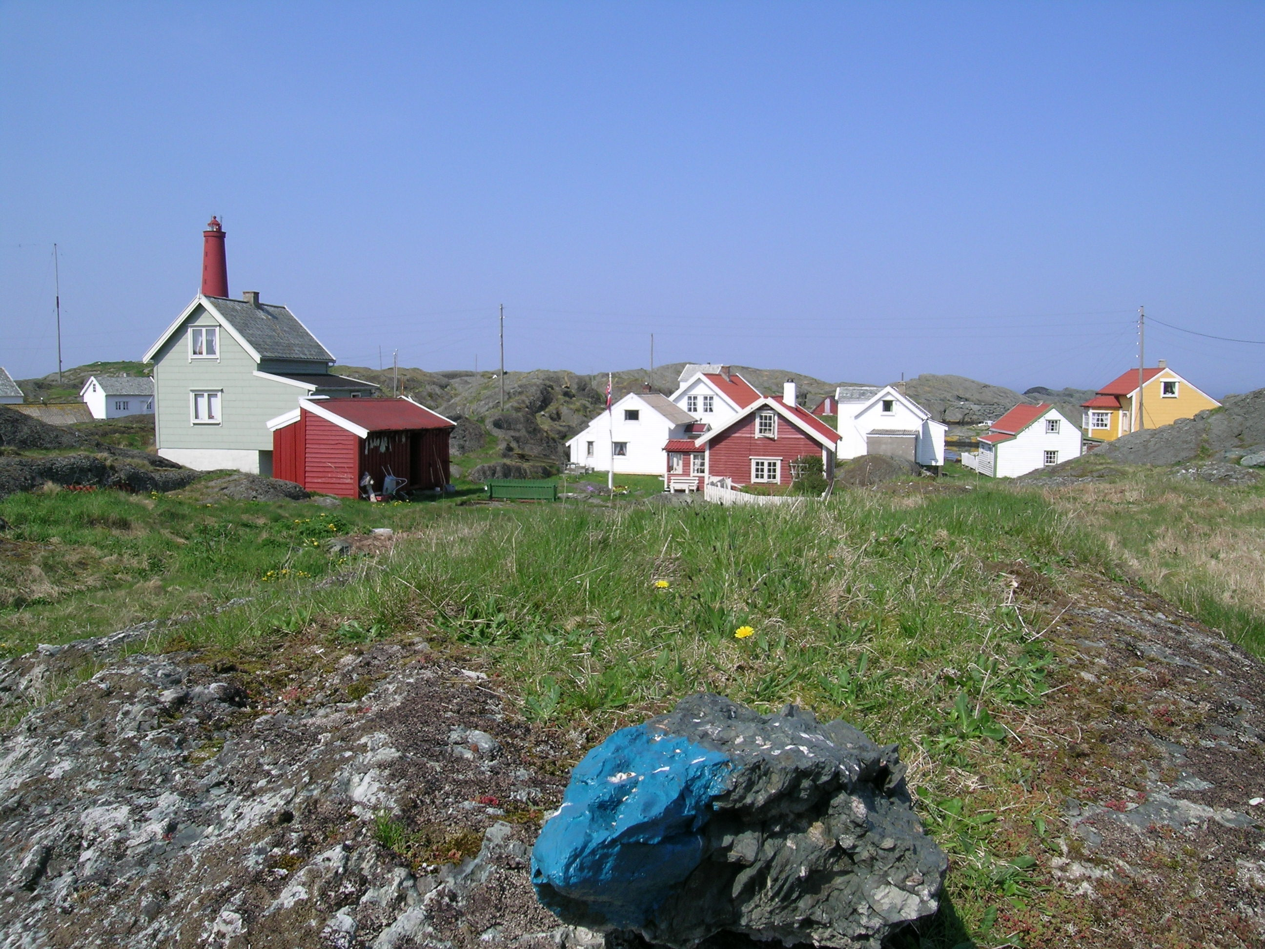 Utvær fyr eller Utvær fyrstasjon ligger i Solund kommune i Sogn og Fjordane. Utvær er det vestligste punktet i Norge, og ligger på øygruppa Utvær, et fredet naturreservat. Fyret har et rødt fyrtårn med lyskilde 45 m.o.h.